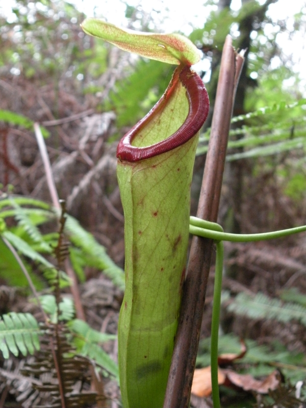 Nepenthes mirabilis, Kelantan, Peninsular Malaysia